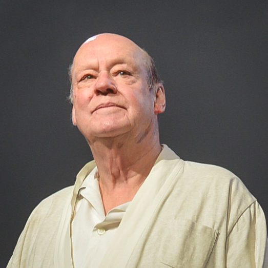 Kung Lear handlar om en makthavare som tappat greppet och hemfaller åt sin fåfänga. Rollen som Kung Lear är Sven Wollters avsked till teatern.